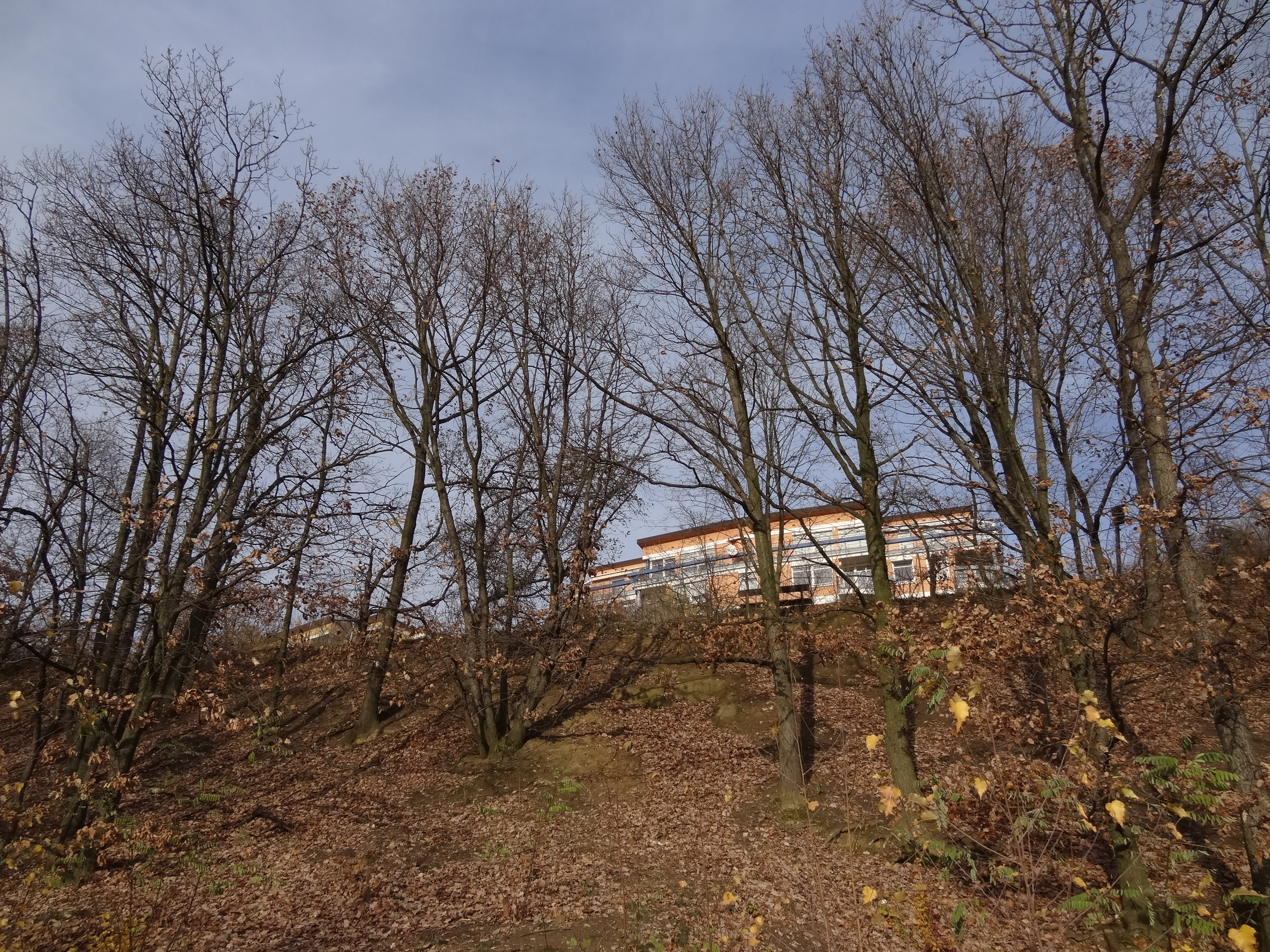 PP Okrouhlík - výhledy z pískovcové skály